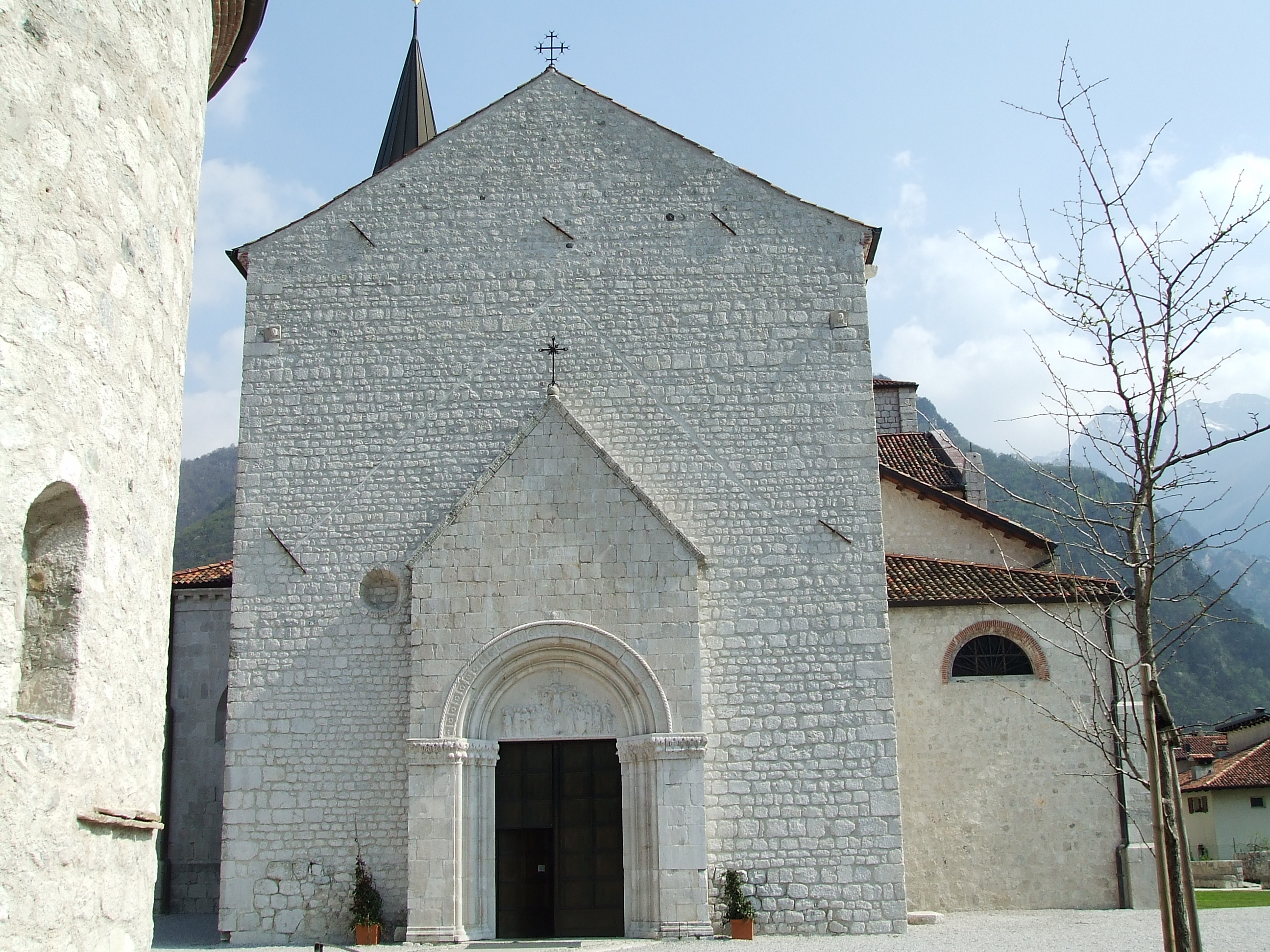 Sebi1, Venzone - Duomo